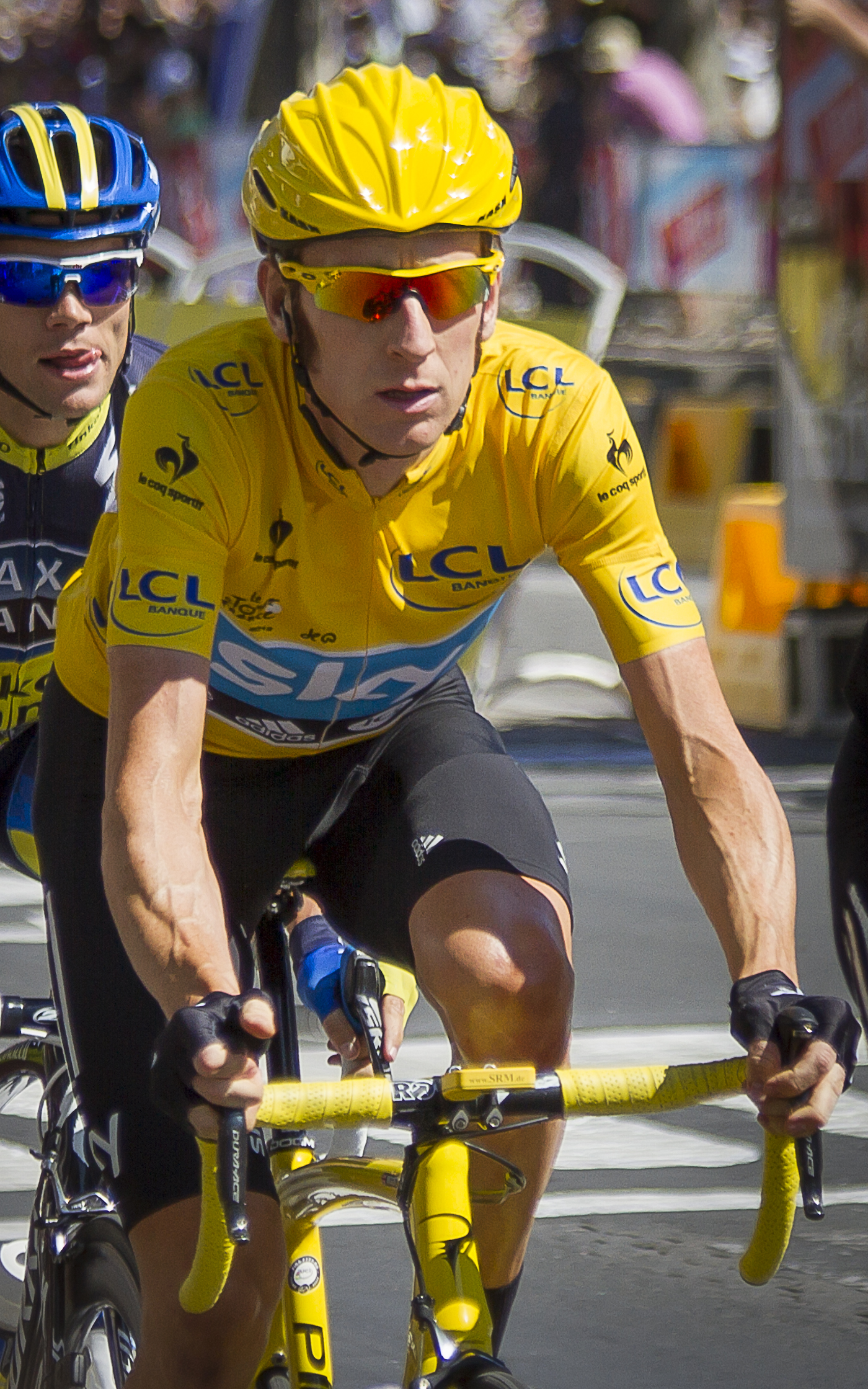 Bradley WIGGINS dans le peloton - 20e étape du Tour de France 2012, arrivée sur les champs Elysées à Paris lors de la dernière étape entre Rambouillet et paris les Champs Elysées le dimanche 22 juillet 2012 - © William Morice / MaxPPP